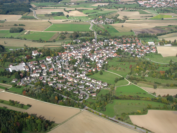 Gottmadingen, Luftaufnahme von Randegg, Bioenergiedorf